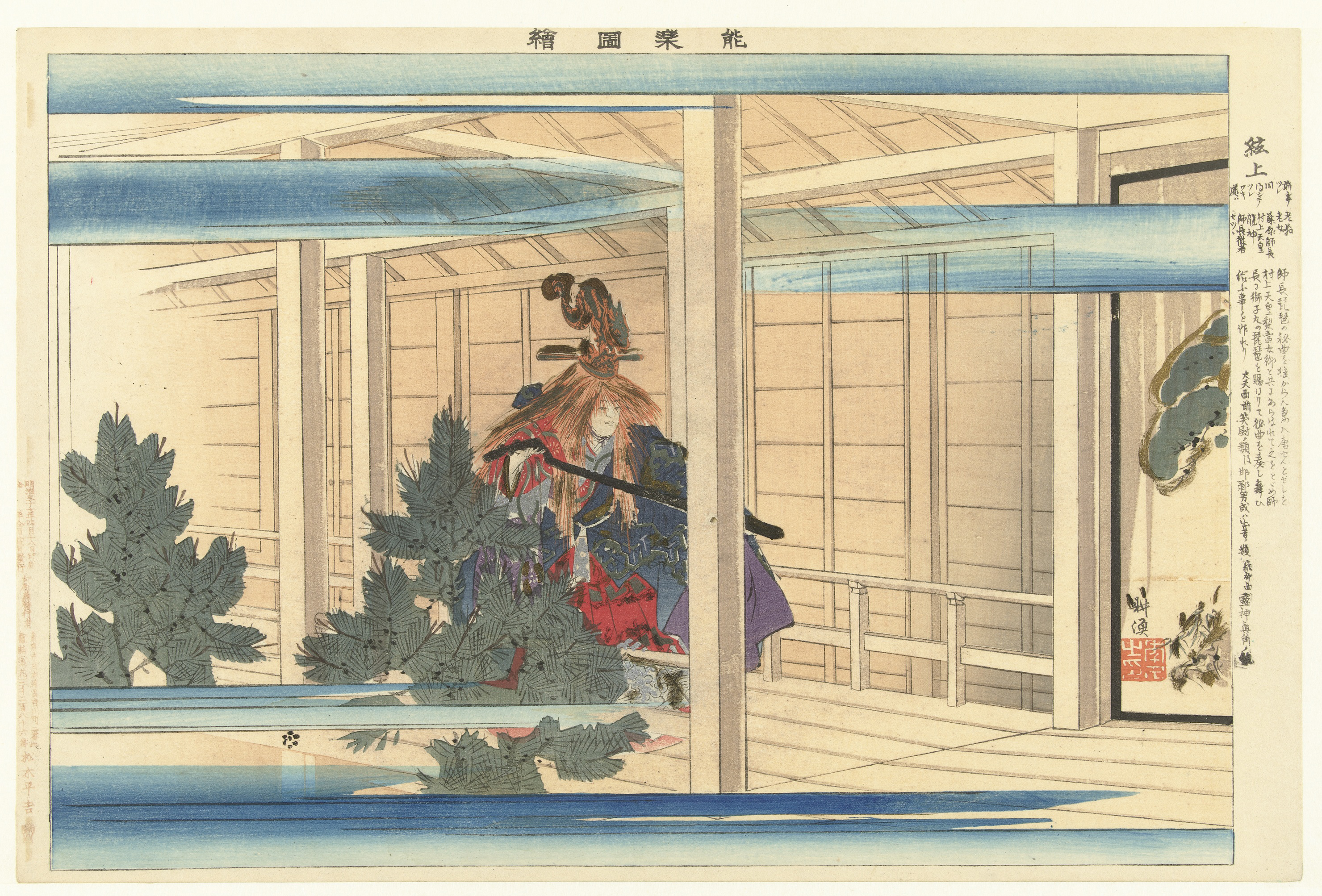 Acteur met wilde rode pruik en hoofddeksel waarop draak in een decor met pijnbomen en een kamerscherm. Label Line: mentioned on object Tsukioka Kôgyo (1869 - 1927), 1904, kleurenhoutsnede; lijnblok in zwart met kleurblokken; zilverpoeder; bronspoeder Collection: prenten; Japan (collectie)